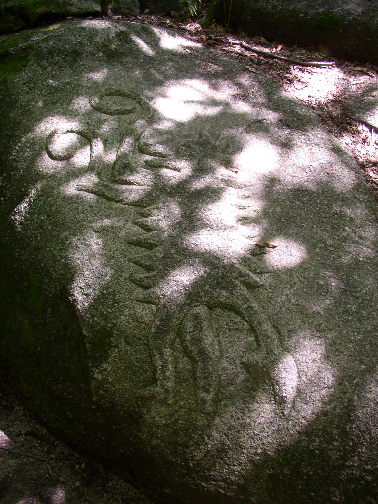 Monotlithe de Chabrières